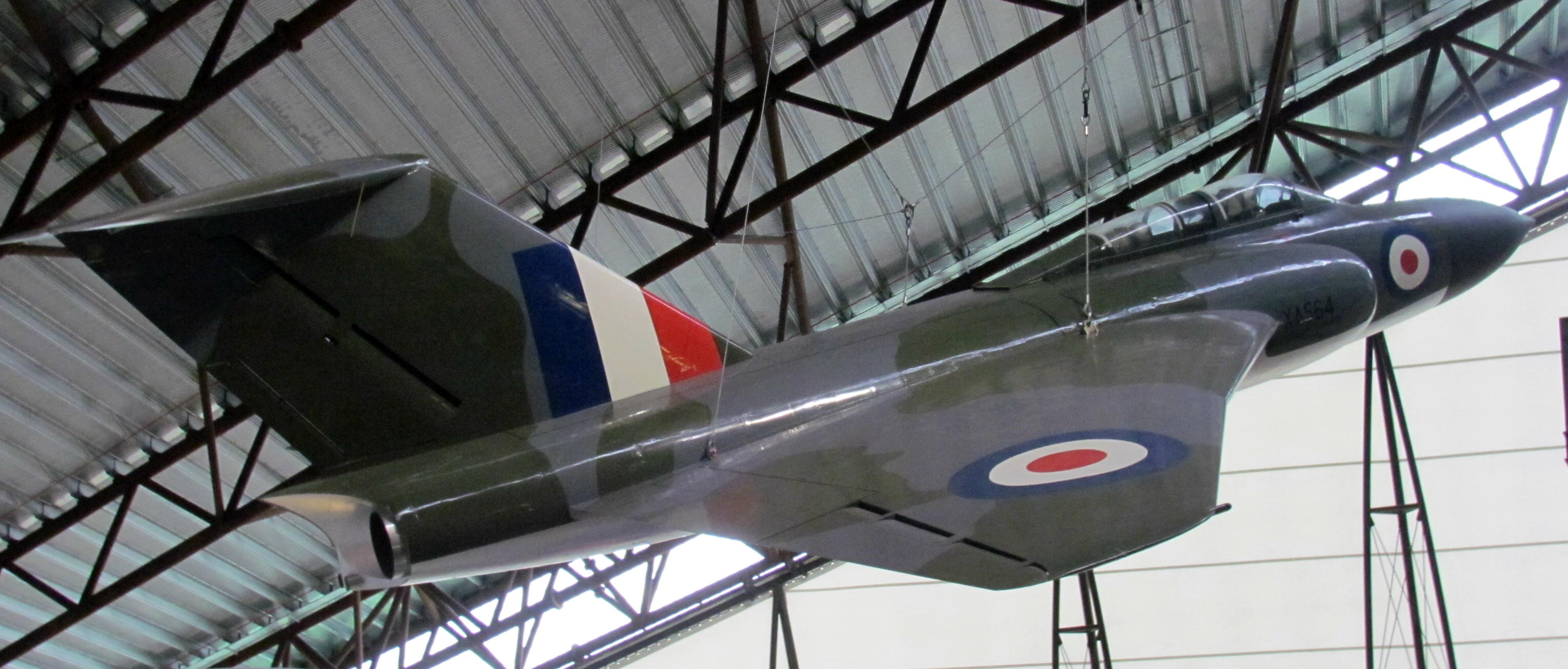 Gloster Javelin FAW1 No.XA564